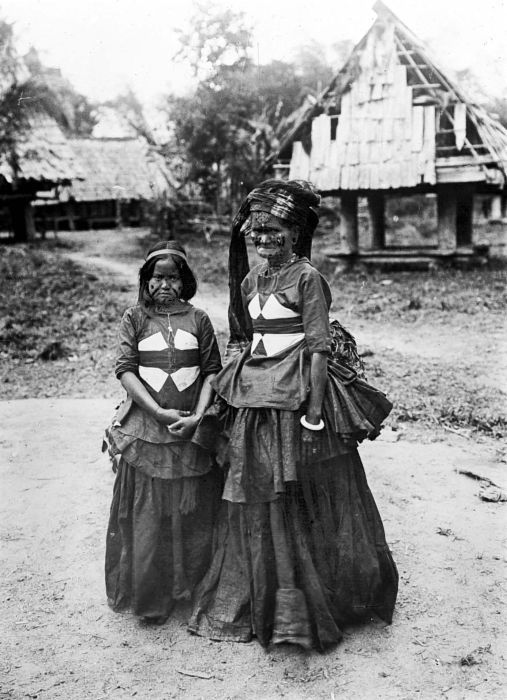 Repronegatief. Twee vrouwen uit Leboni in feestkleding